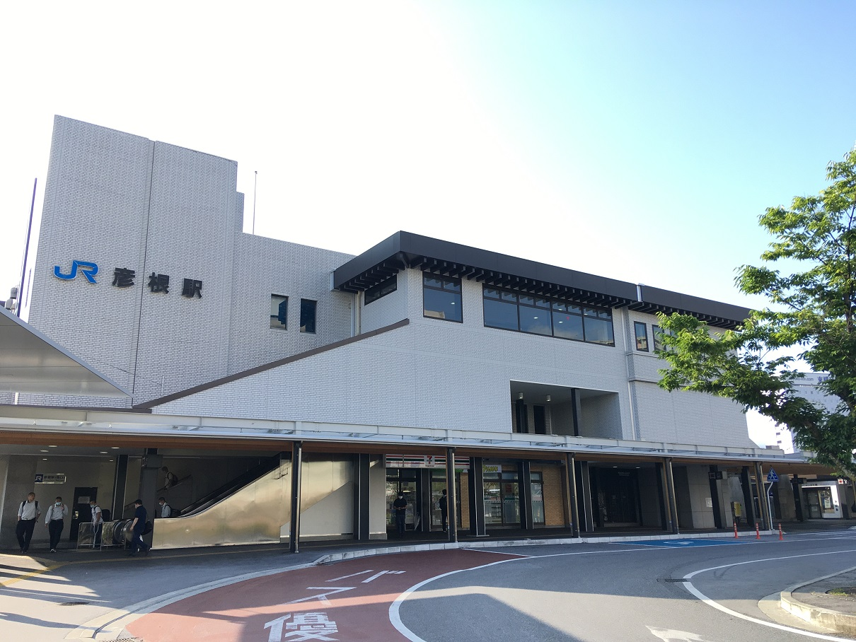 彦根駅西口駅舎